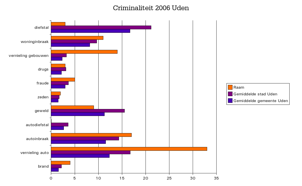 Criminaliteitcijfers in Uden Raam (2006), Noord-Brabant, The Netherlands